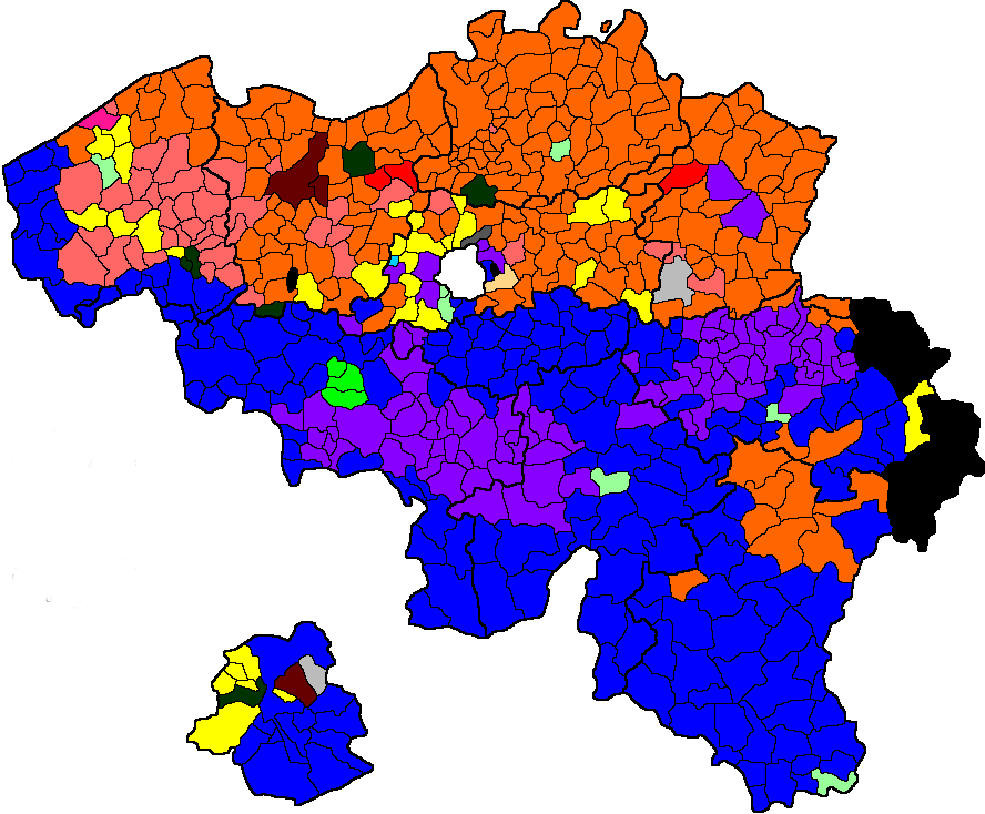 Aangepaste versie van file:Belgique-Communes589-Provinces10.gif. Elke gemeente is ingekleurd om te tonen welke groep buitenlanders in die gemeente het grootste is. Met "buitenlanders" worden mensen zonder Belgisch paspoort bedoeld. De kaart houdt dus geen rekening met nieuwe Belgen en allochtonen. Gegevens van statbel en [ hier] te vinden. Legenda: Nederland Frankrijk Duitsland Italië Polen Roemenië Bulgarije Portugal Marokko Turkije Verenigde Staten India Congo-Kinshasa Afghanistan Verenigd Koninkrijk Spanje